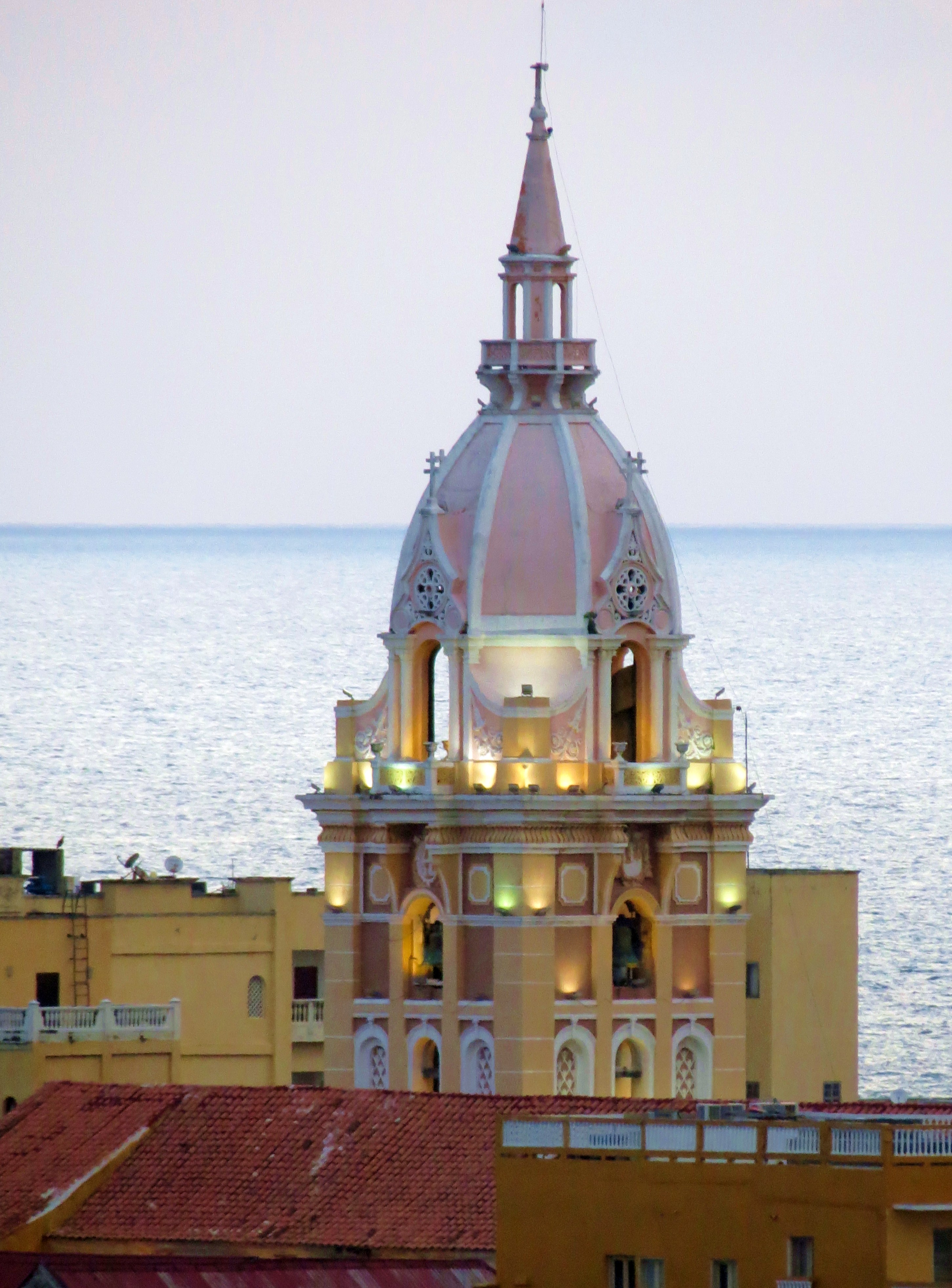 La Catedral de Santa Catalina de Alejandría, oficialmente Catedral Basílica Metropolitana de Santa Catalina de Alejandría, es una iglesia catedralicia colombiana de culto católico romano bajo la advocación de Santa Catalina de Alejandría